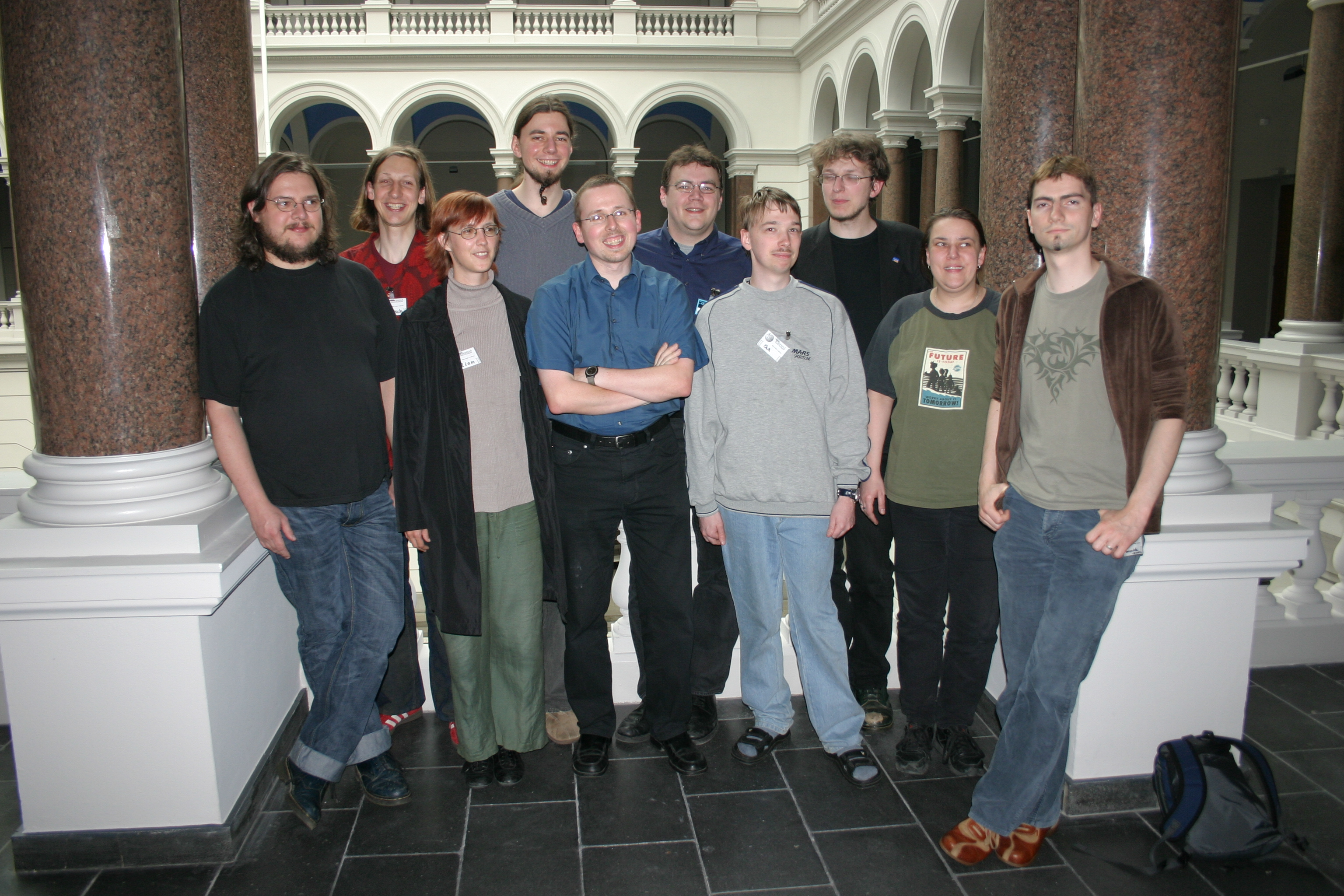 Vorstand von Wikimedia Deutschland – Gesellschaft zur Förderung Freien Wissens am 13. Juni 2004 in der Technischen Universität Berlin.